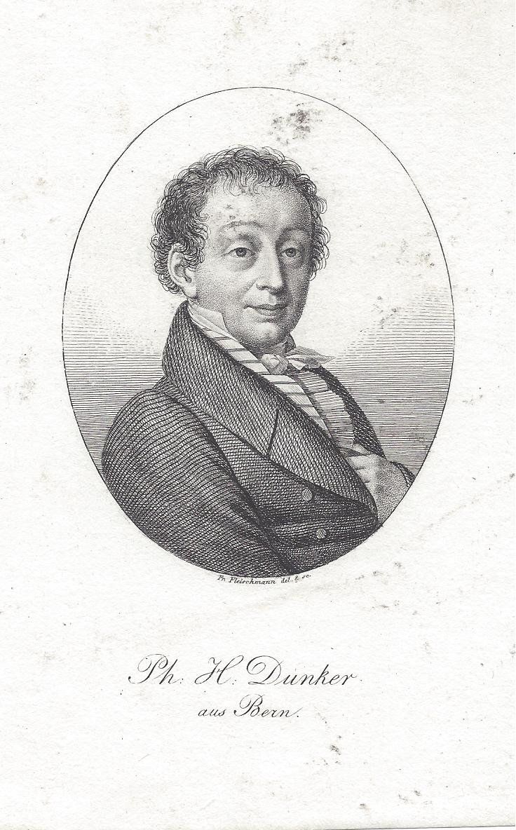 Philipp Heinrich Dunker (1781-1836) Kupferstichvignette von Friedrich Fleischmann (1791-1834)